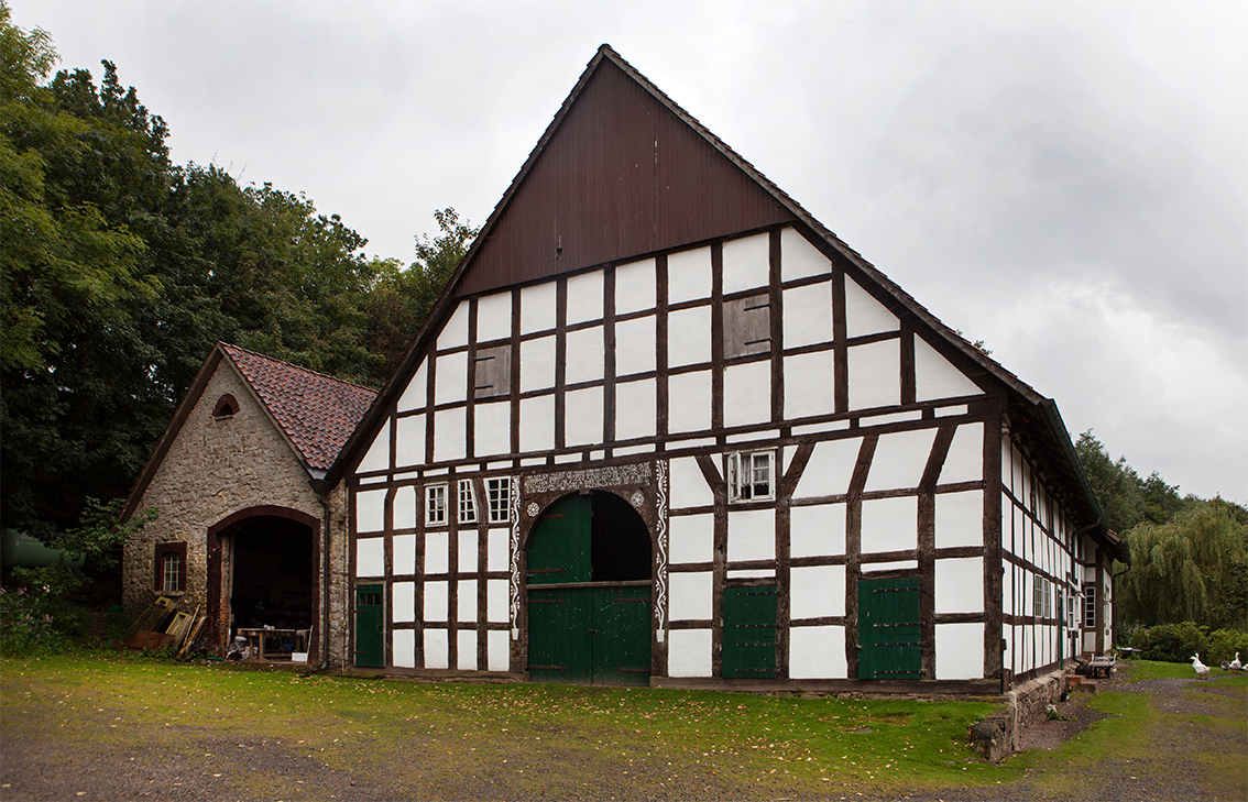 Hohenhausen-Dalbke, Hofanlage Klemme This is a photograph of an architectural monument.